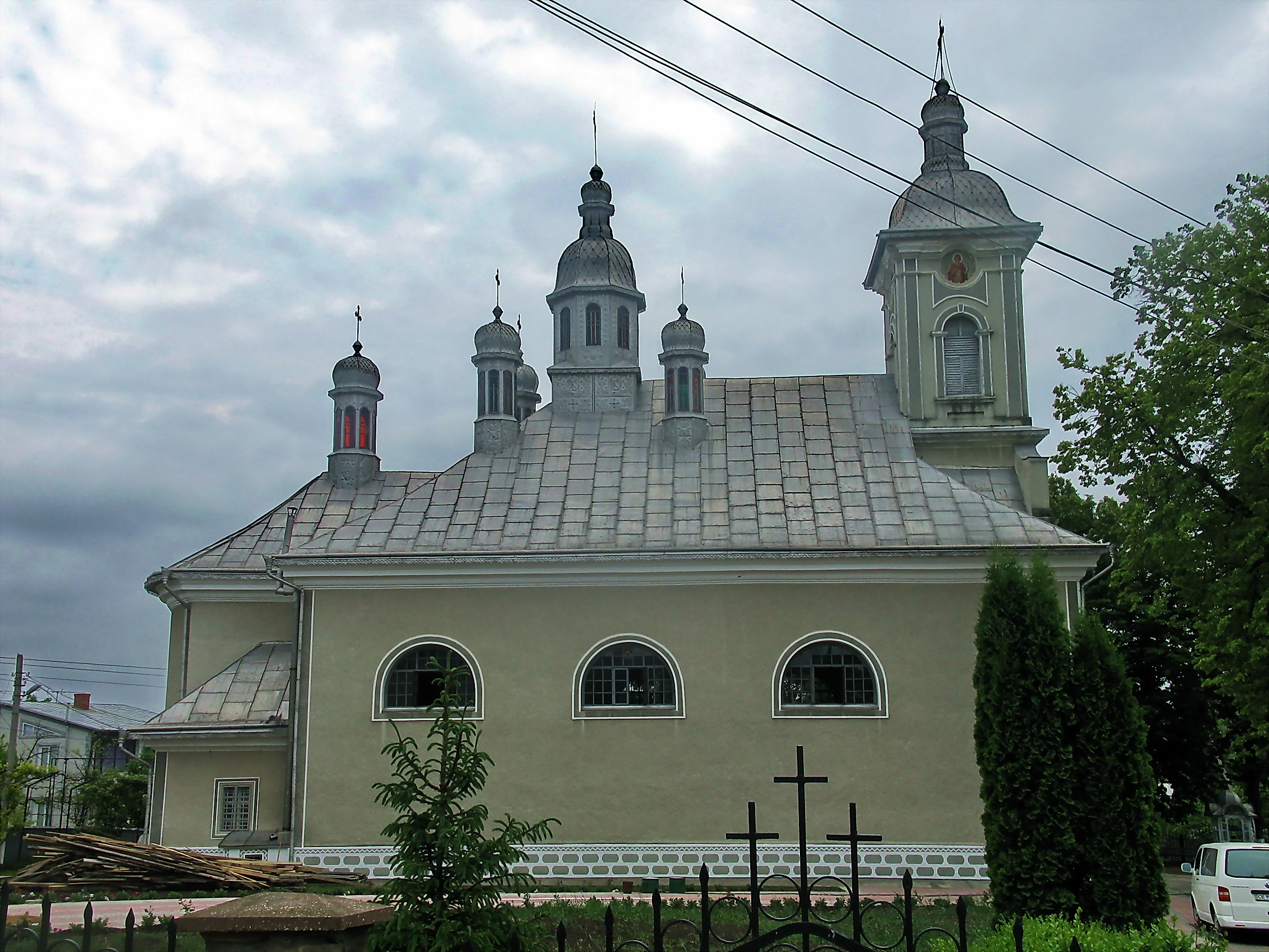 Троїцька церква (мур.), Магала